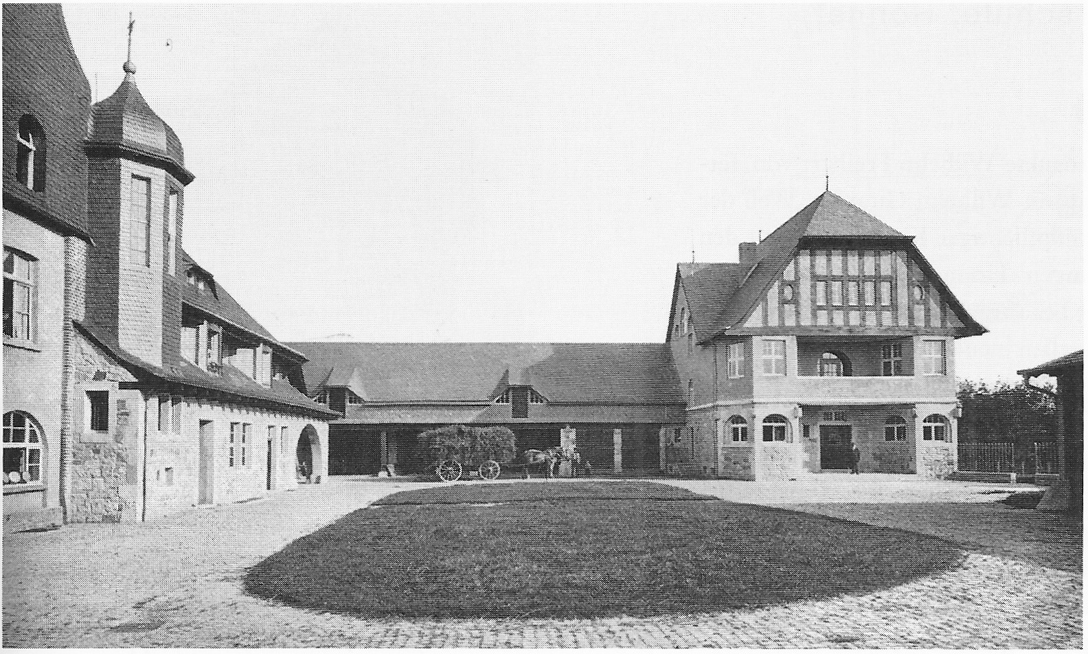 Gut Laagshof, Ittenbach: Remisen und Wohnhaus (hinten), Inspektorenwohnhaus (vorne links)